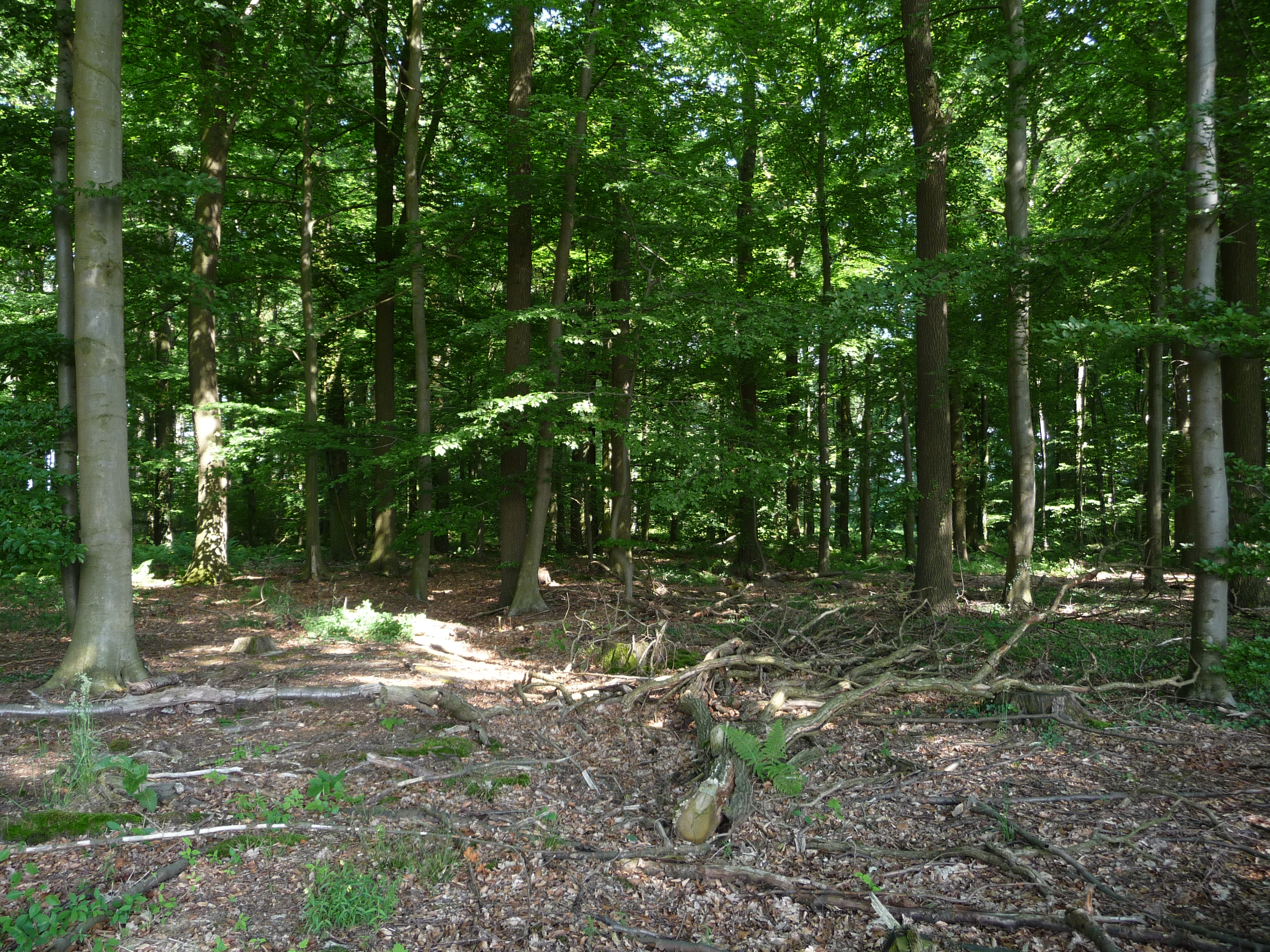 Ein kleines Waldgebiet über Neuenkirchen, landschaftlich reizvoll eingebettet.